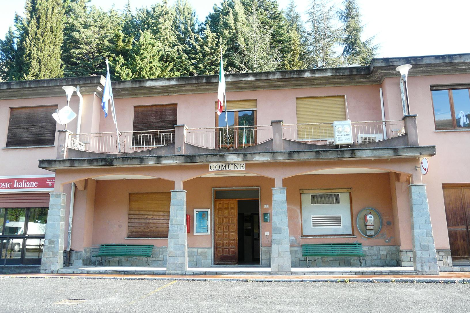 Stellanello, Liguria, Italia Stellanello, Liguria, Italia